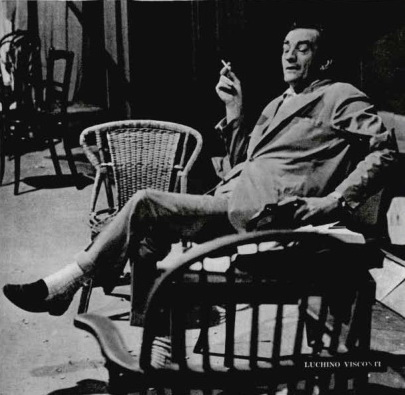 Italian director Luchino Visconti